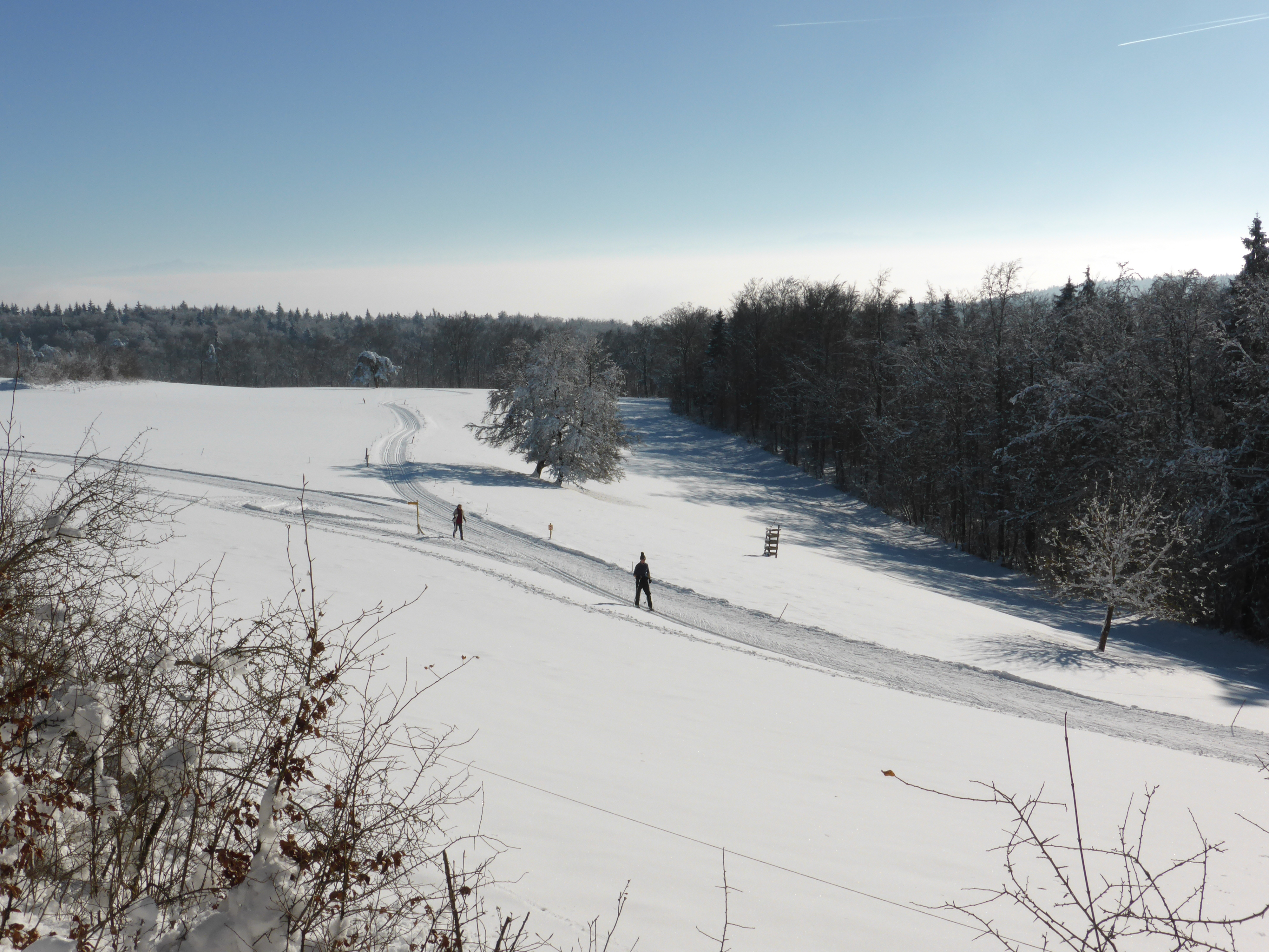 Langlauf auf dem Siblinger Randen, Kanton Schaffhausen/Schweiz